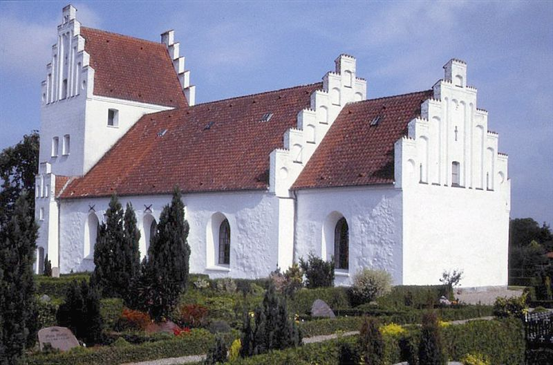 Jordløse Kirke i Danmark. Jordløse kirke